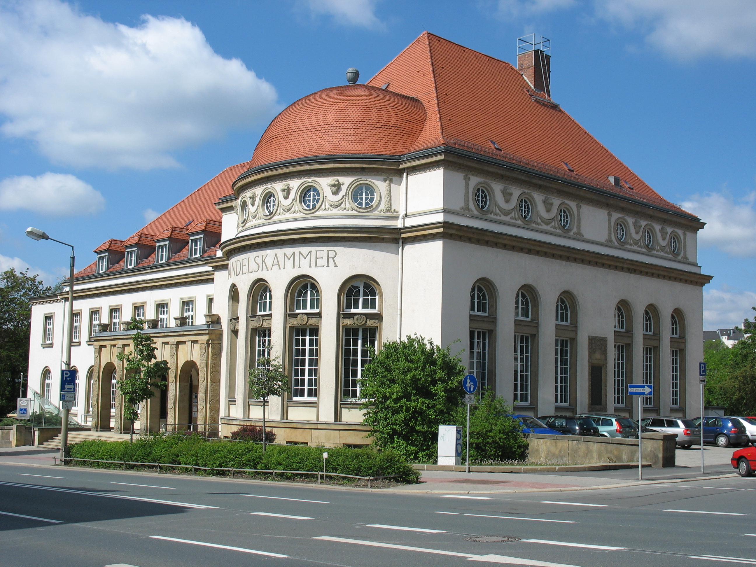 Plauen, denkmalgeschütztes Gebäude der Handelskammer (Friedensstraße 32). Heute Sitz der Regionalkammer der Industrie- und Handelskammer Chemnitz